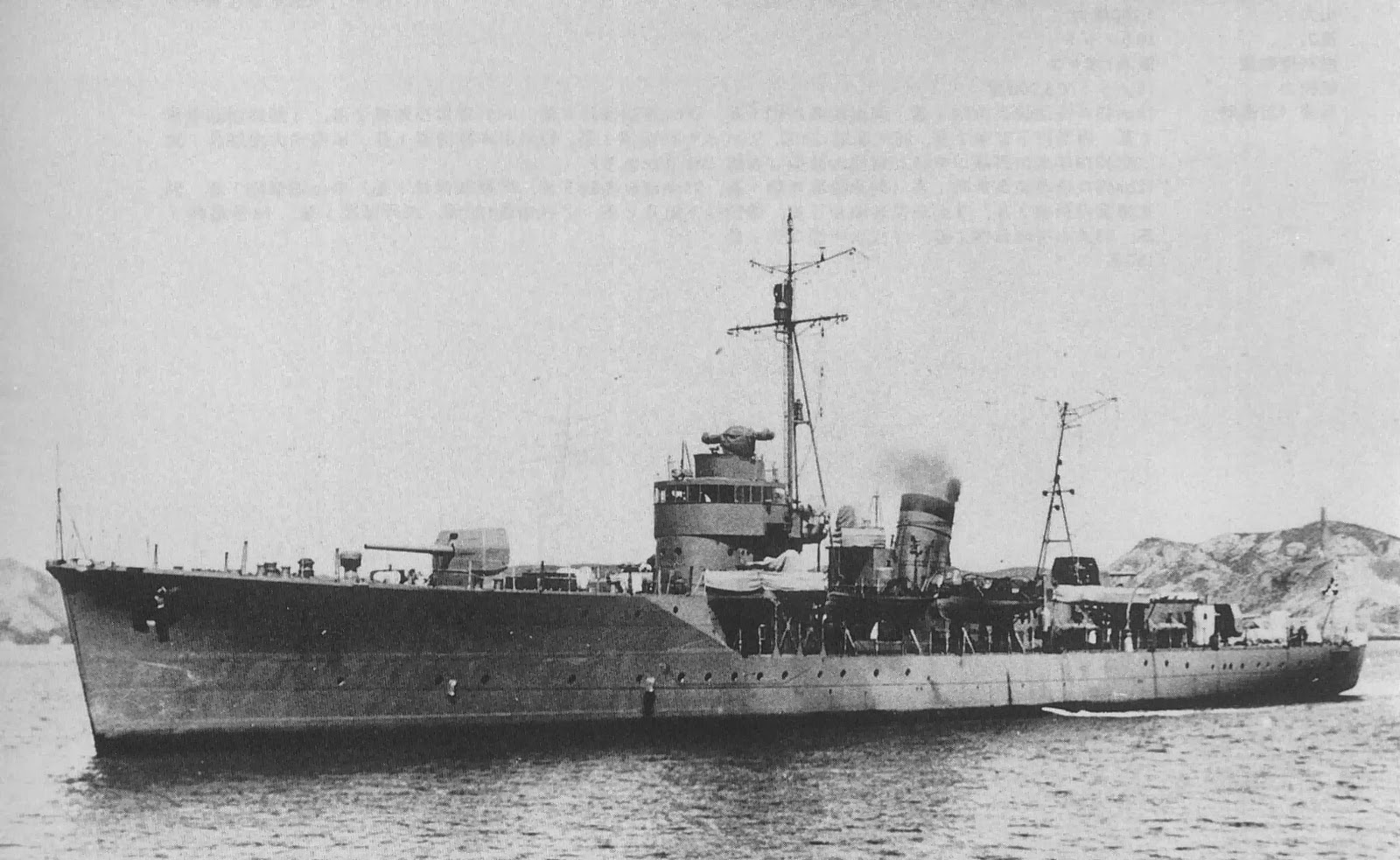 日本海軍 占守型海防艦「松輪」、玉野造船所